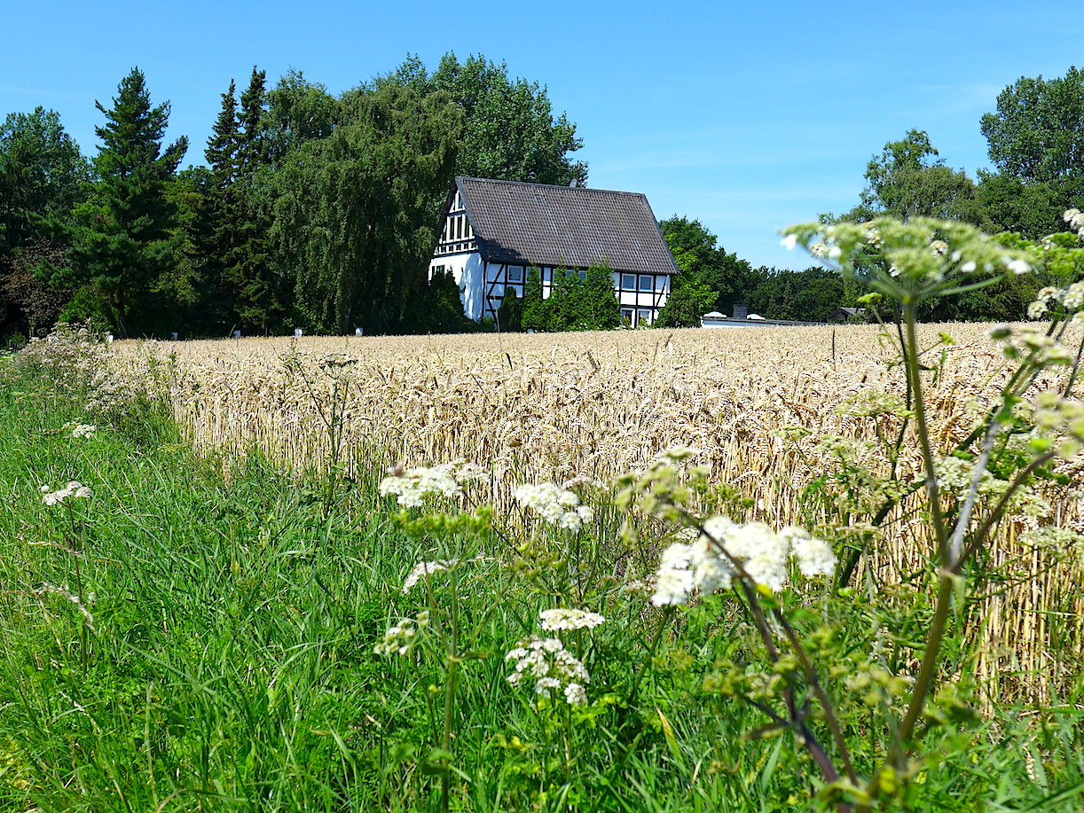 Этап "Ниренхоф-Фельберт" маркированного турмаршрута "Тропа Неандерланд", Северный Рейн-Вестфалия, Германия.